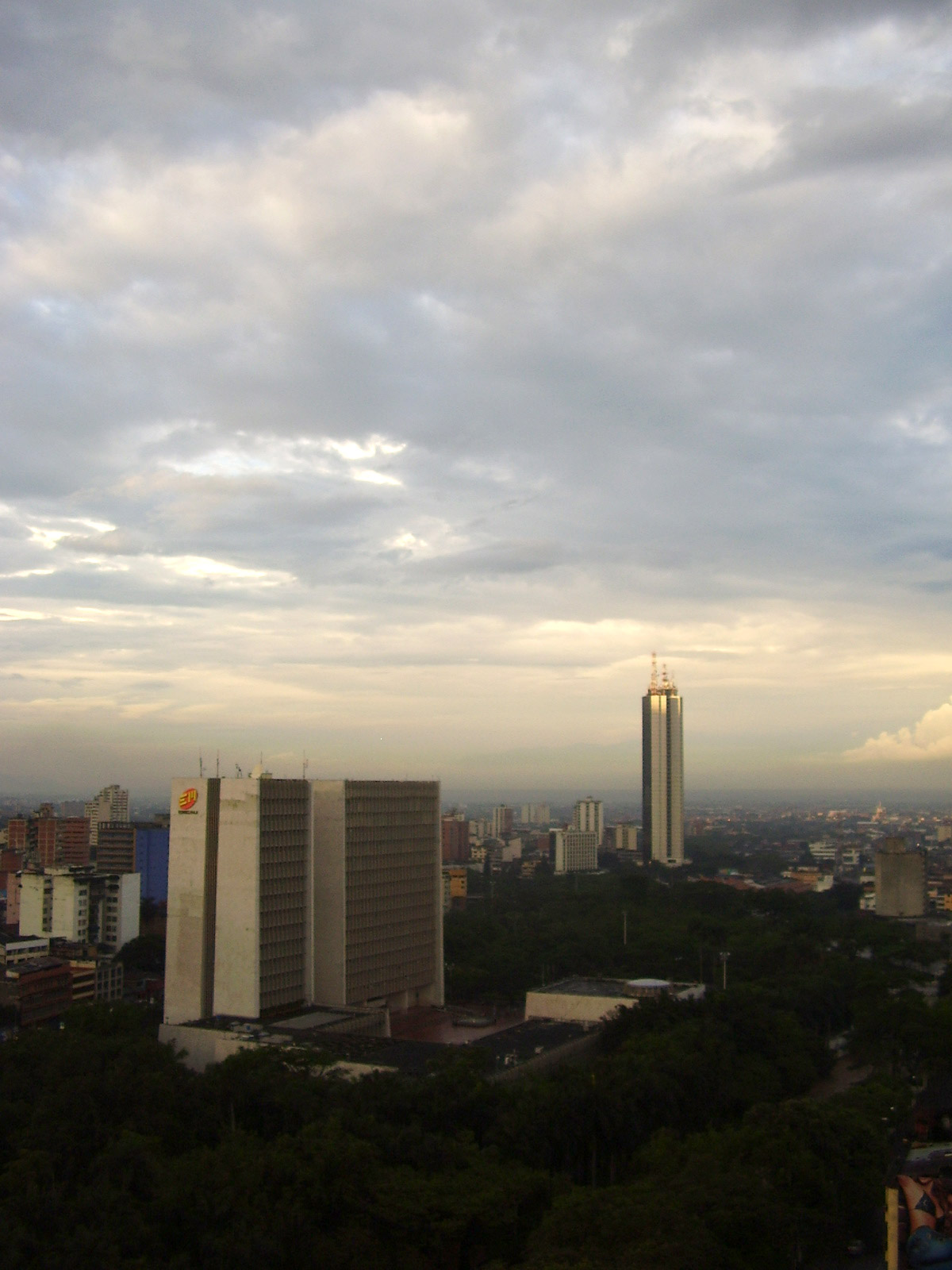 Centro Administrativo Municipal (CAM), Cali, Colombia. Al fondo el edificio "Torre de Cali".